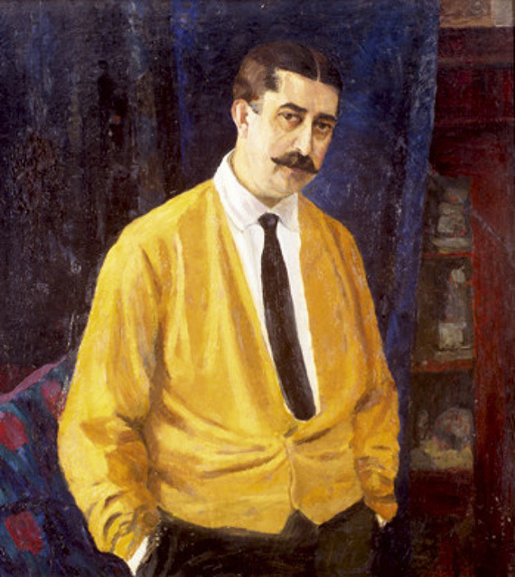 Портрет Николая Дмитриевича Бартрама (искусствовед, музейный деятель, коллекционер).